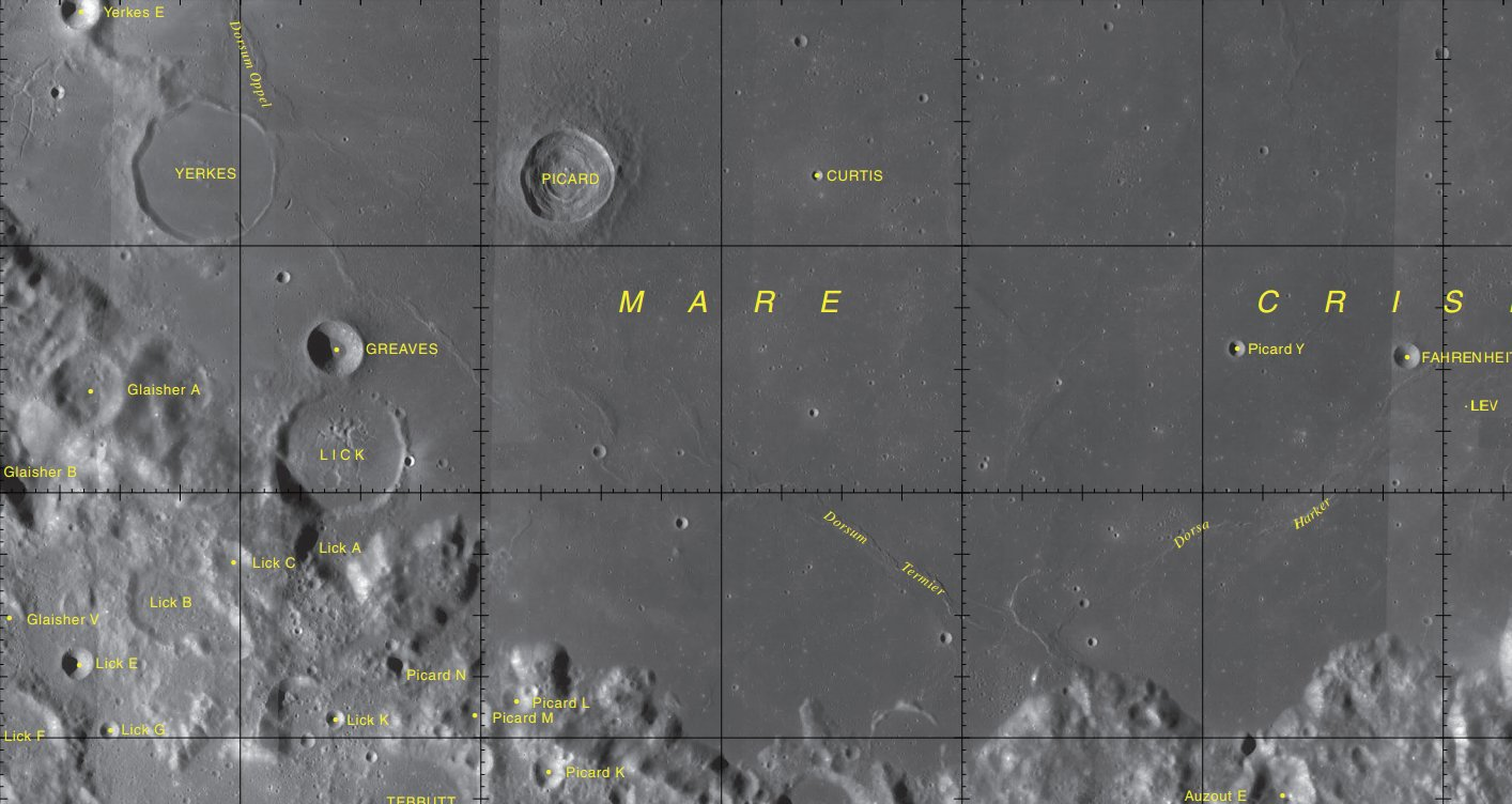 Cráter lunar Curtis. Localización (LRO)